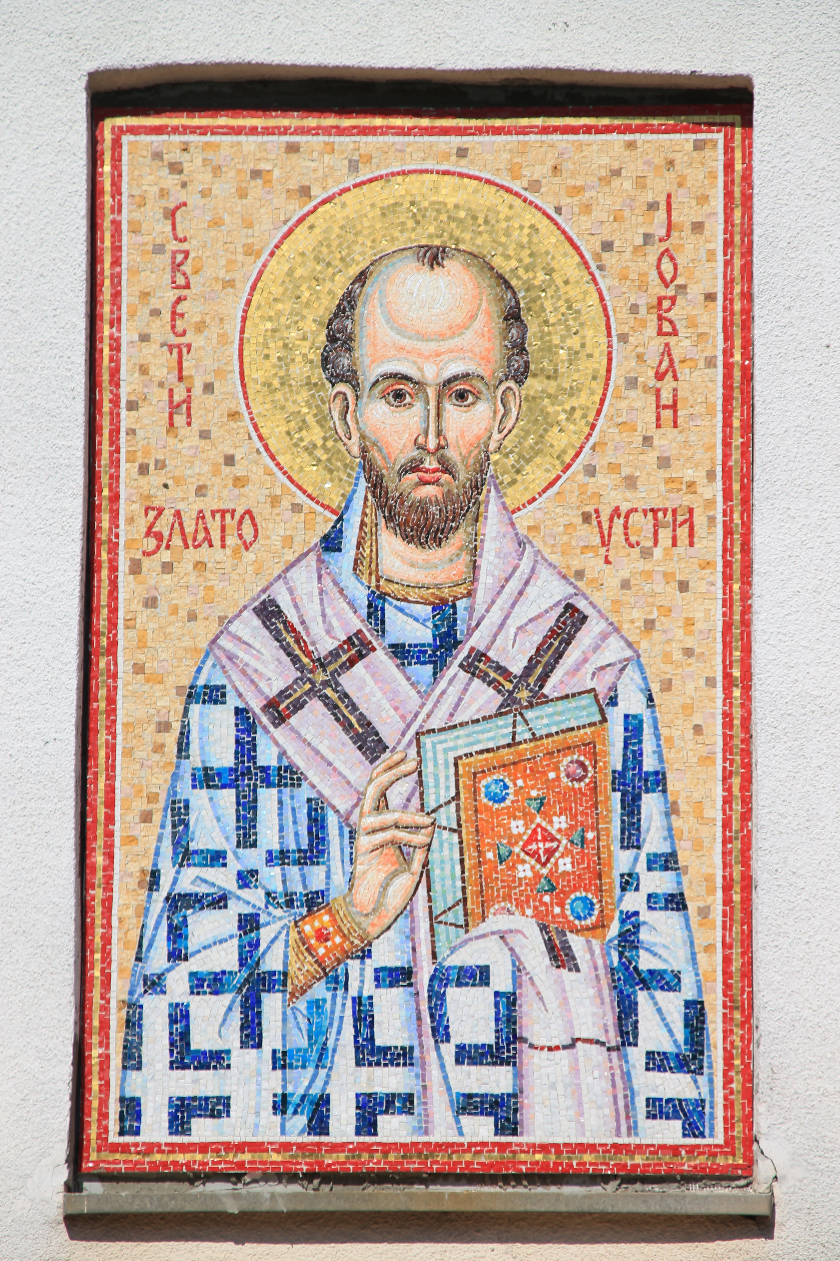 Crkva Sv. Jovana Zlatoustog (Silbaš)